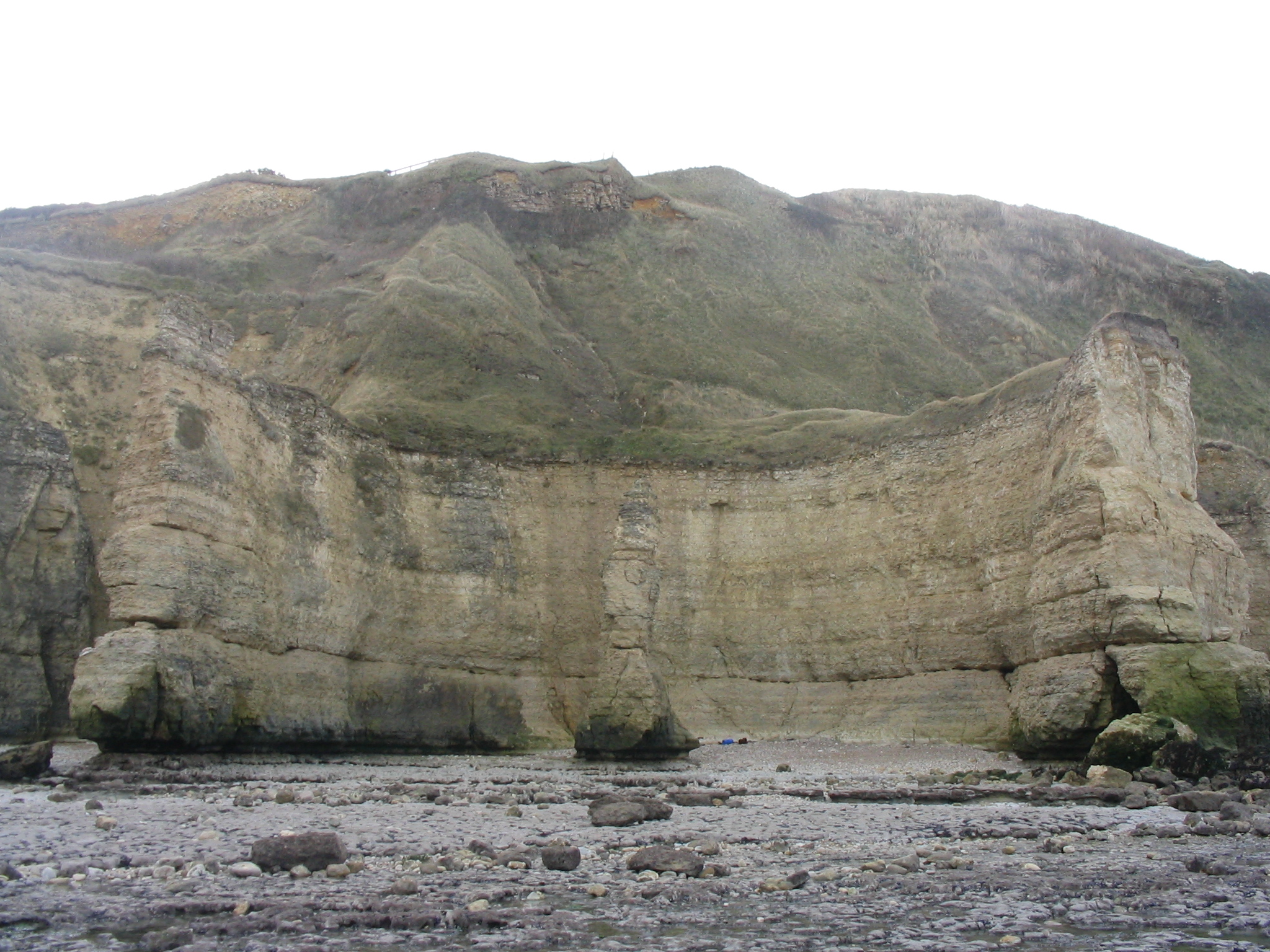 Steilküste Normandie